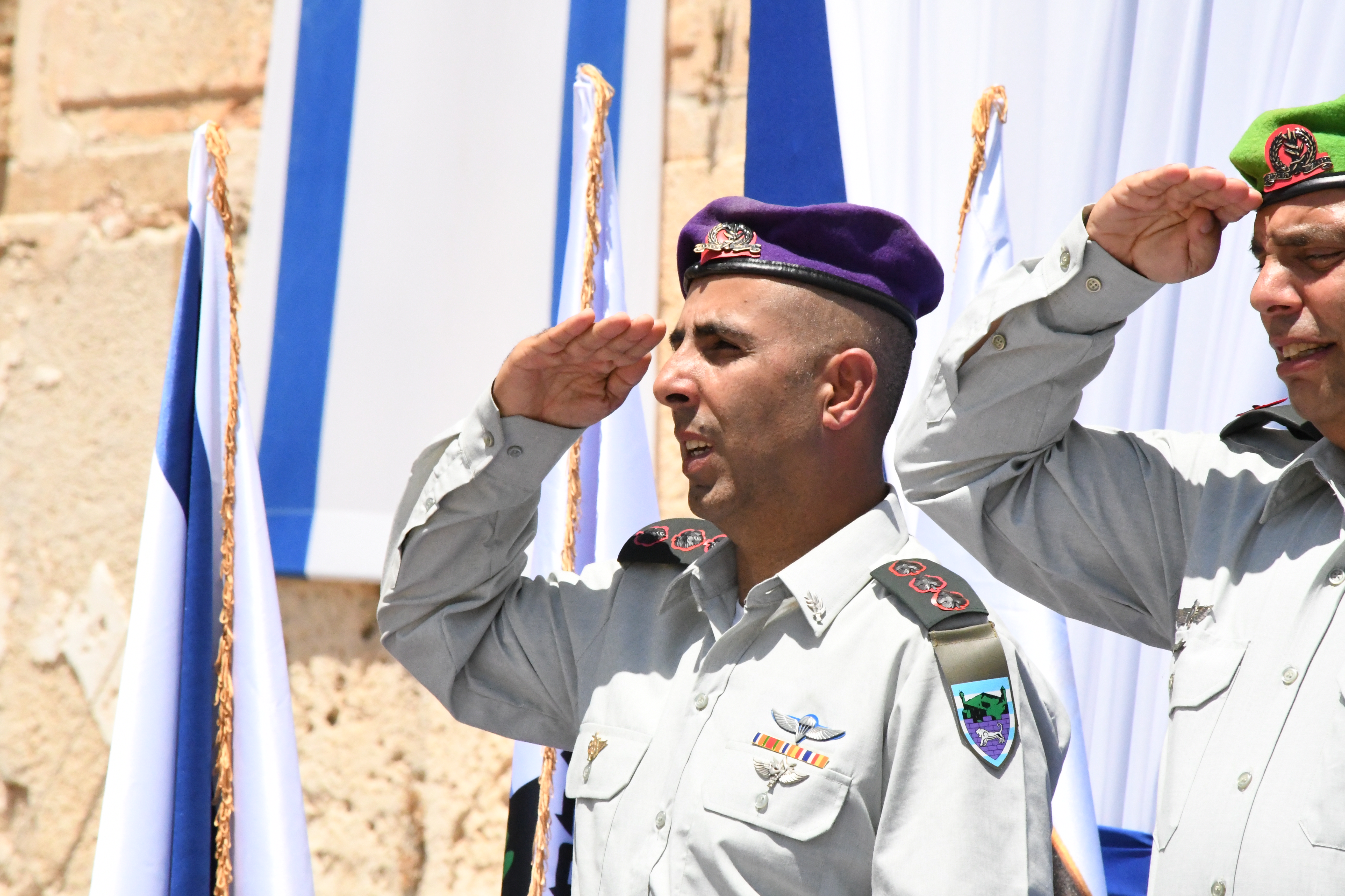 בעת החלפת מפקד חטיבת יהודה